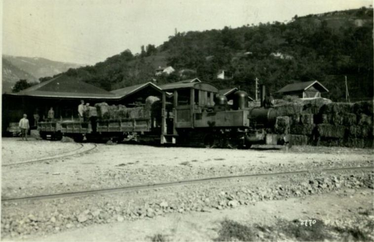 Ferrovie Decauville presso Caltrano